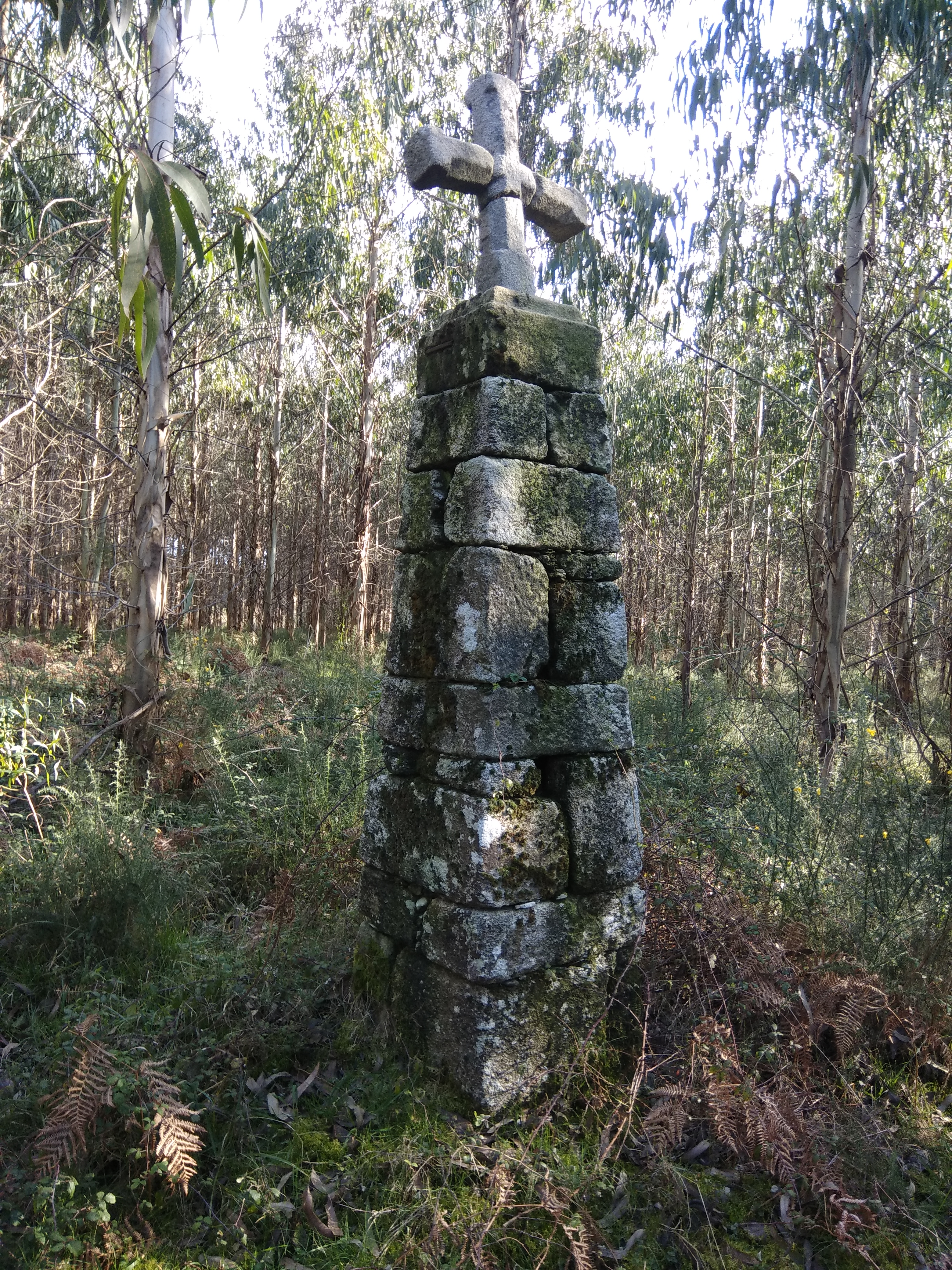 Cruceiro da Corda na Ciadella (Sobrado, Galiza).